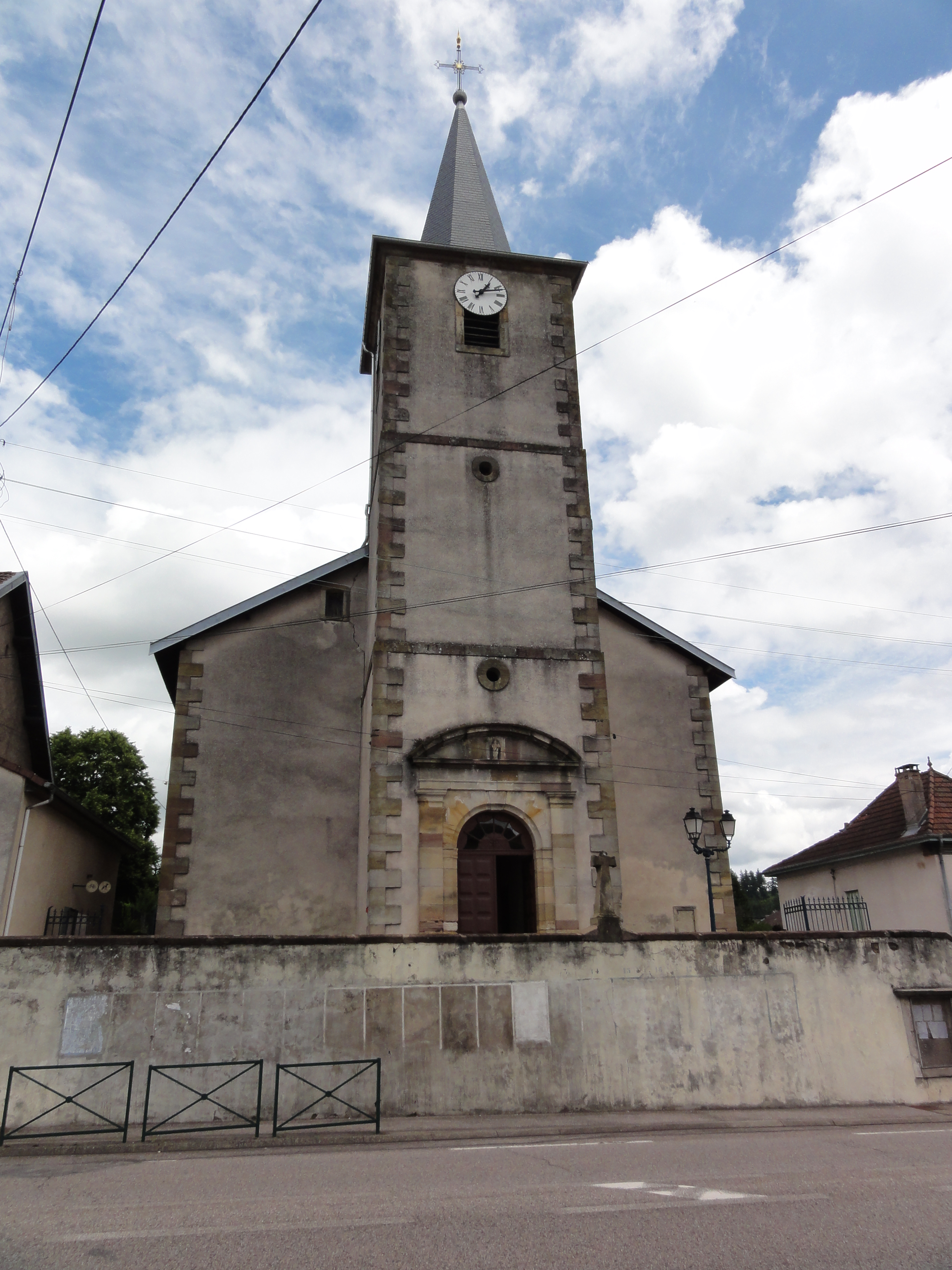 Bertrichamps (M-et-M) église Saint-Jean-Baptiste